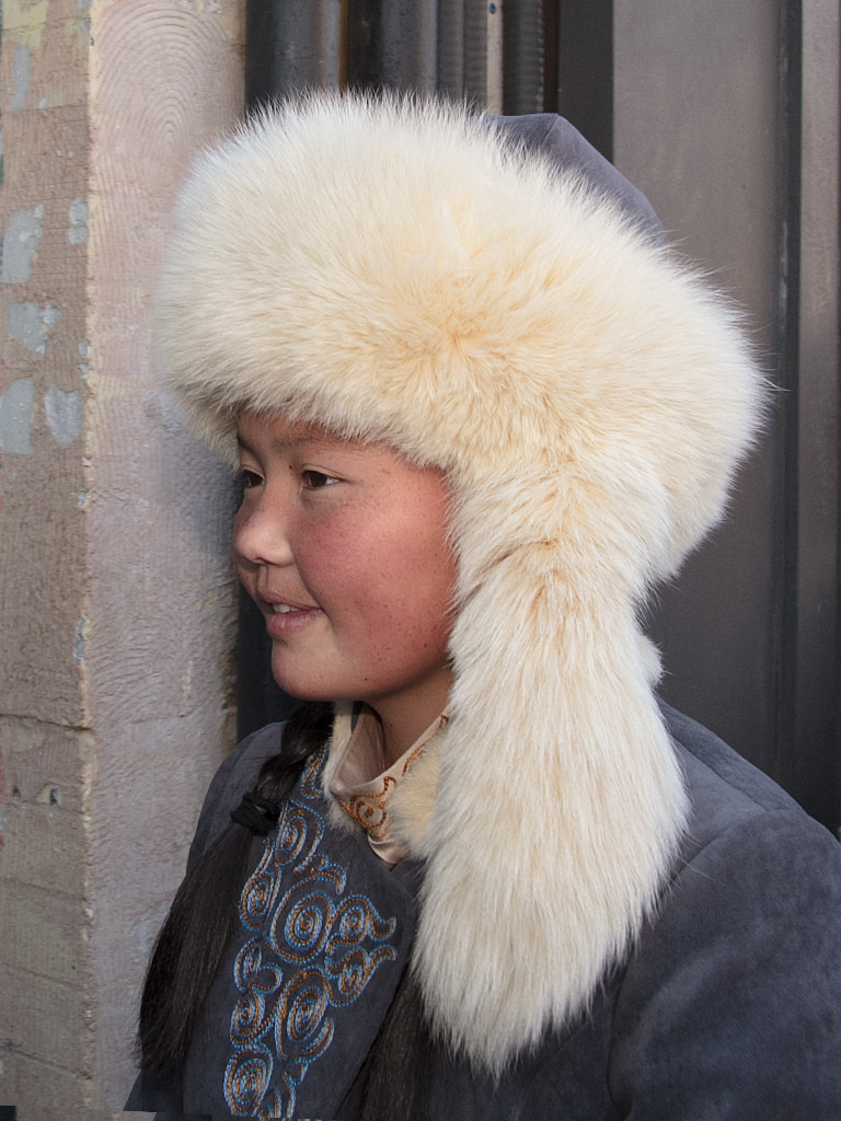 Toronto International Film Festival 2016